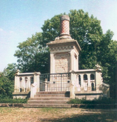 Denkmal für die 1870/71 gefallenen Corps-Studenten, errichtet 1872, in der Nähe der Rudelsburg / Monument for the War 1870/71